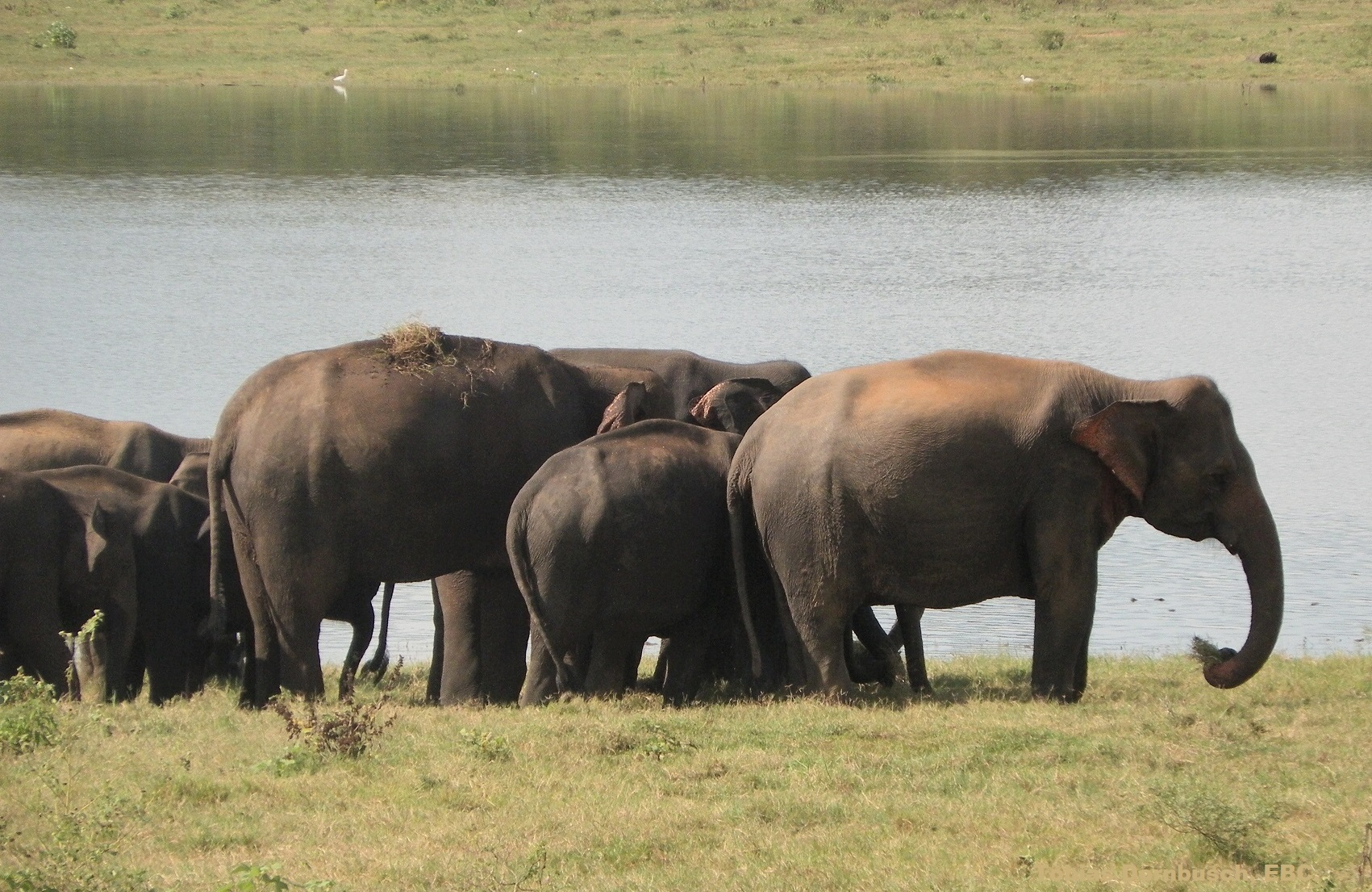 Herde Asiatischer Elefanten im Kaudulla Nationalpark, Sri Lanka. Es handelt sich um eine Gruppe weiblicher, miteinander verwandter Tiere, einschließlich noch nicht geschlechtsreifer, männlicher Nachkommen.